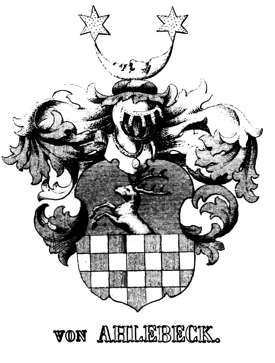 Wappen der Familie von Ahl(e)beck.